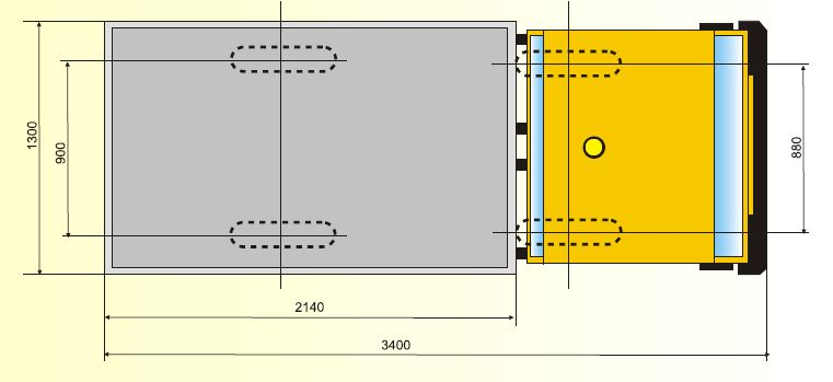 размери на Пони-01